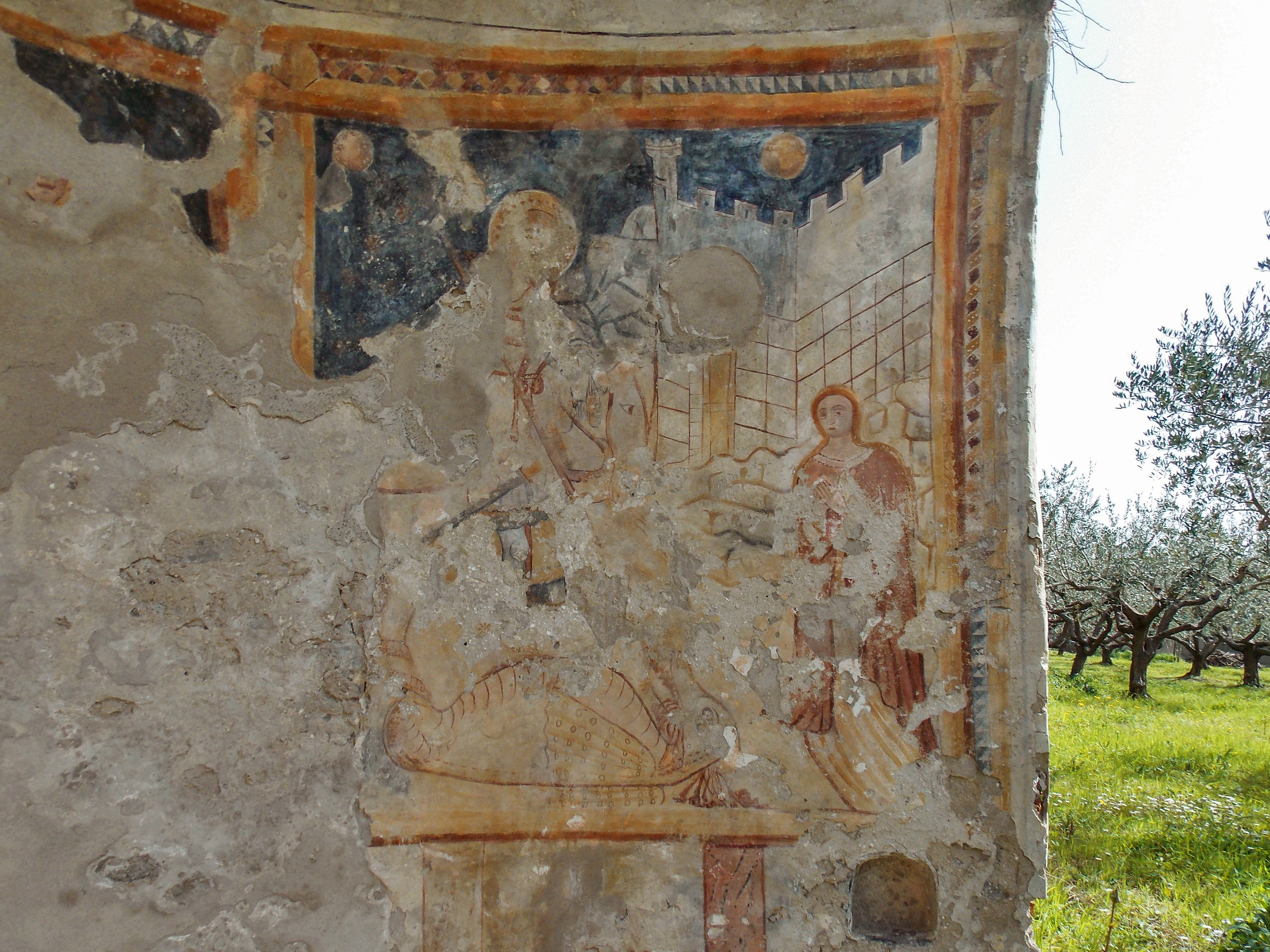 I ruderi dell'abside dell'oratorio di San Giorgio a Faicchio (BN) con gli affreschi, dipinti fra il X e il XV secolo